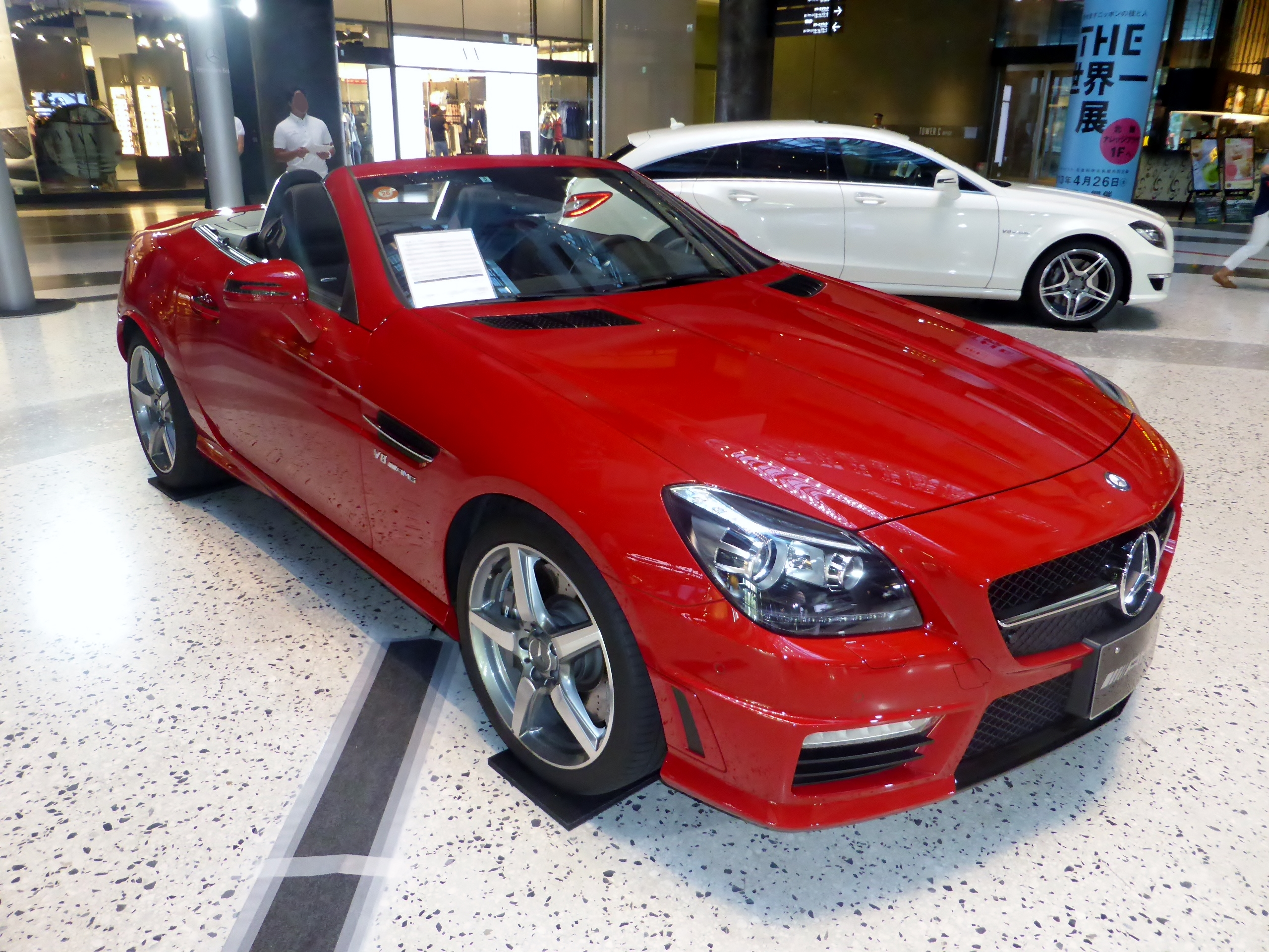 R172型メルセデス・ベンツSLK55AMGをフロントから撮影。